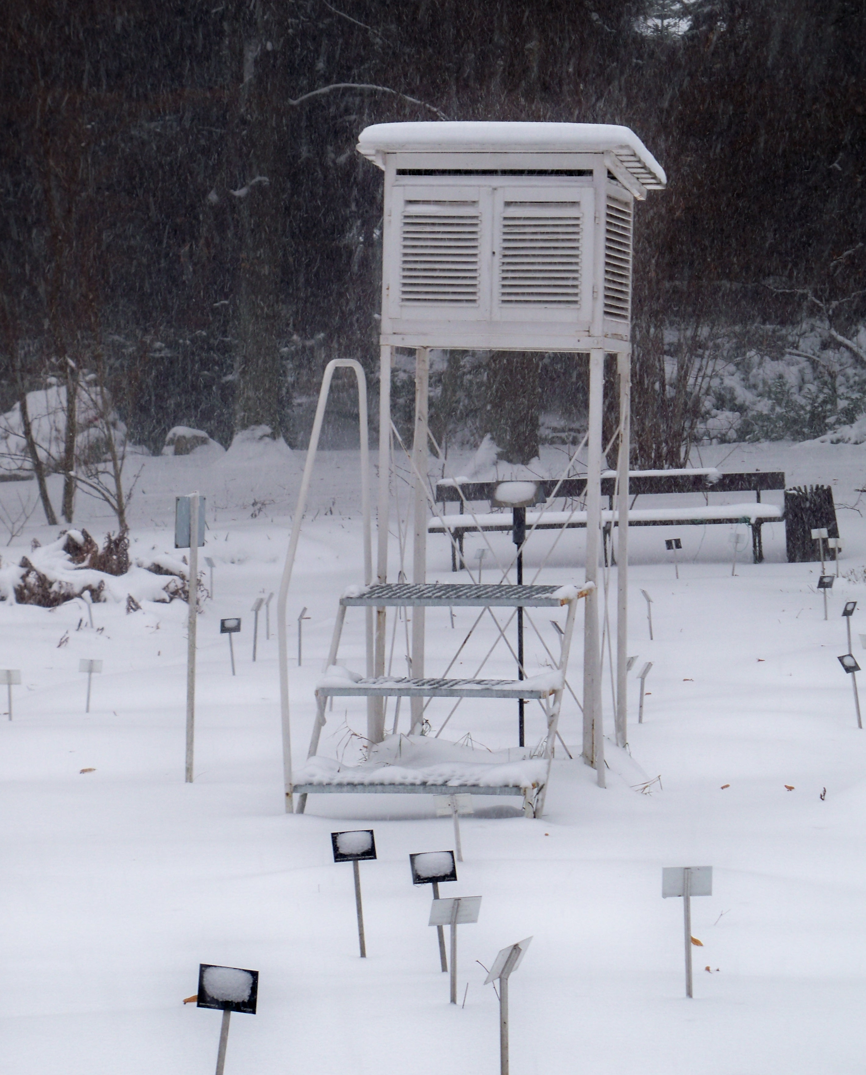 Klatka meteorologiczna w Ogrodzie Botanicznym Uniwersytetu Warszawskiego.